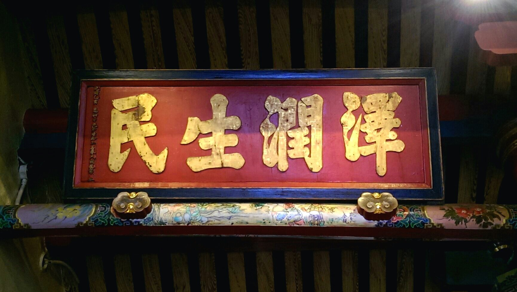 元保宮-澤潤生民匾